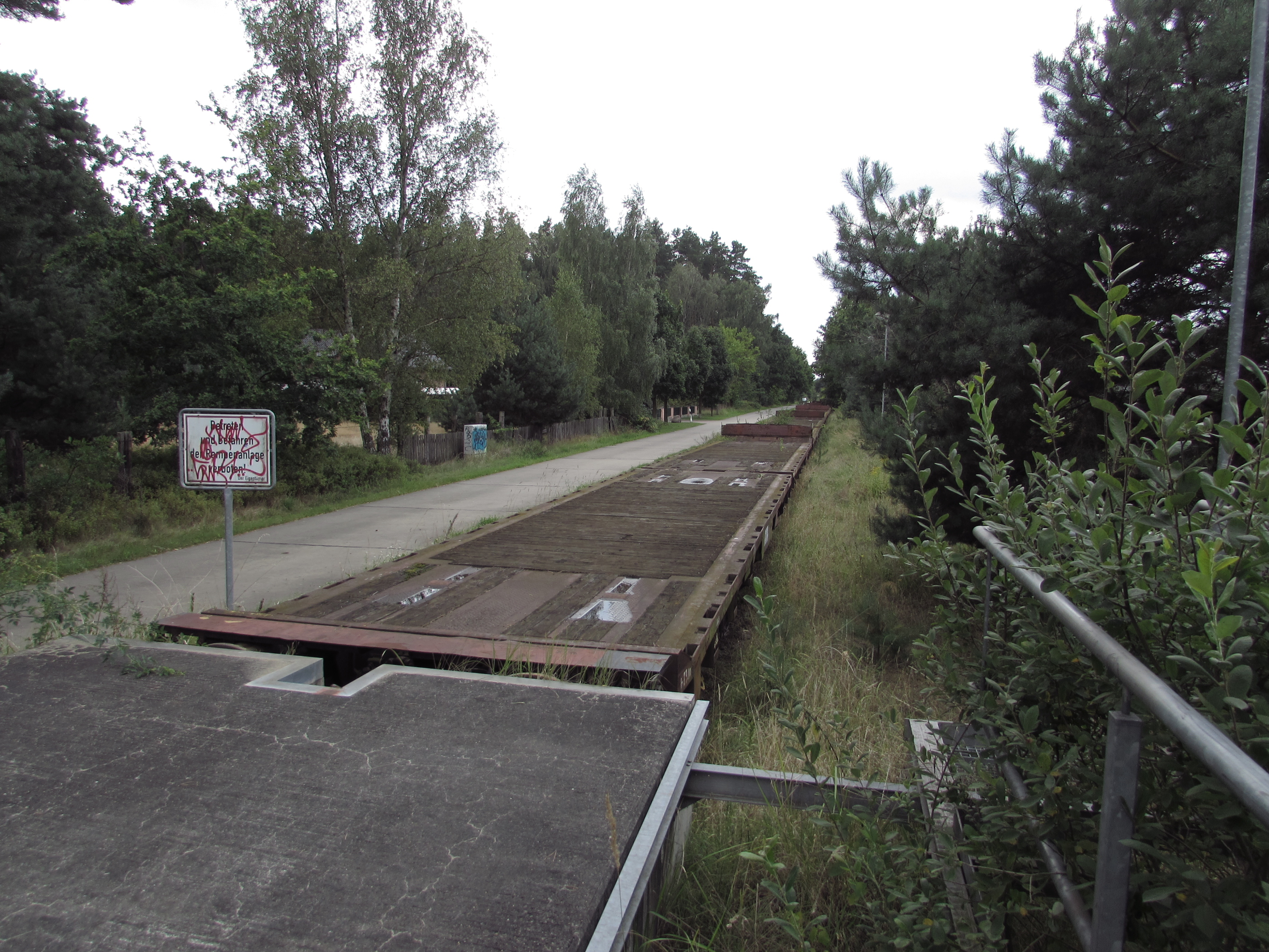 ende der westhavelländischen in brielow ausbau